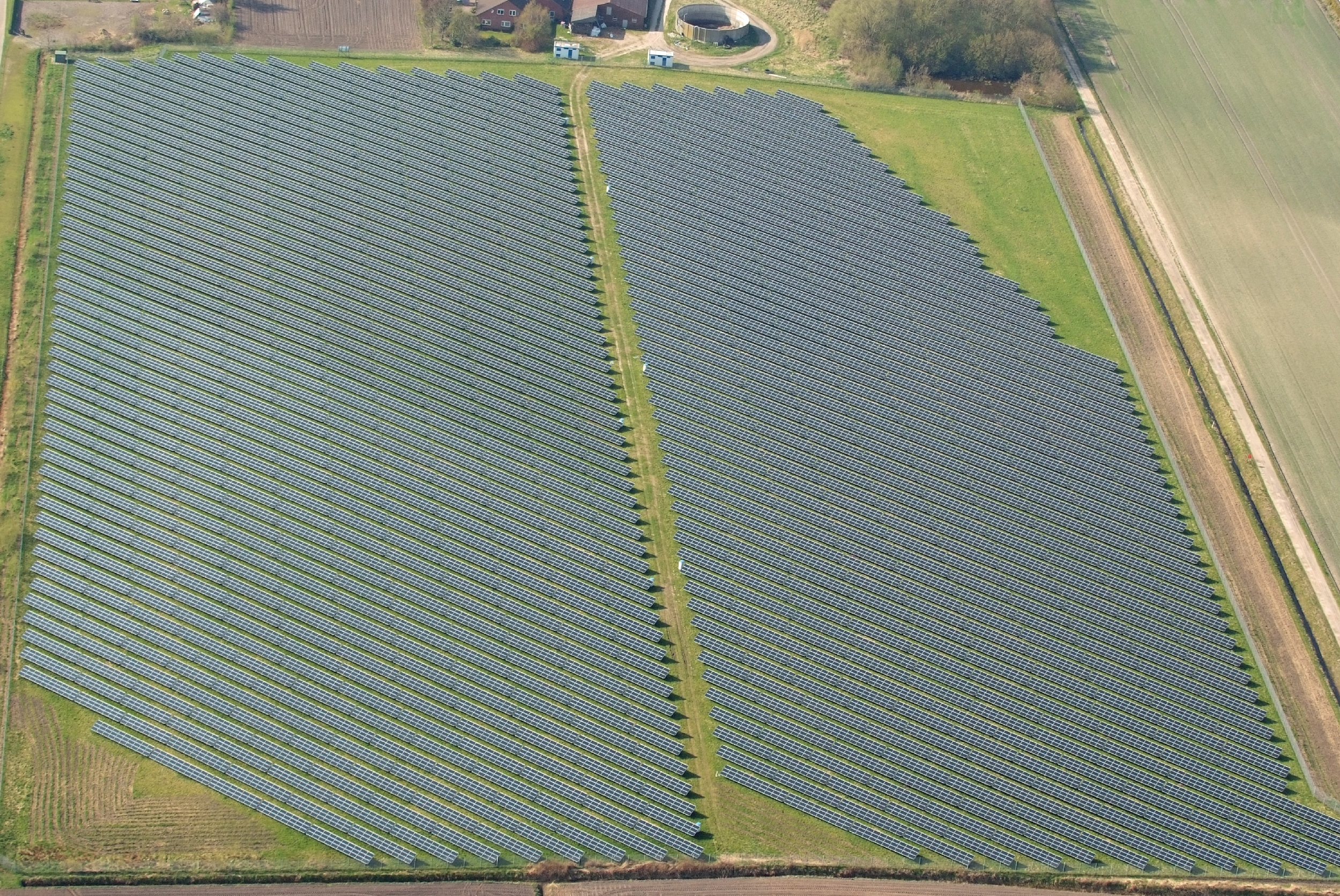 Solaranlage bei Victorbur / Fotoflug von Nordholz-Spieka nach Oldenburg und Papenburg